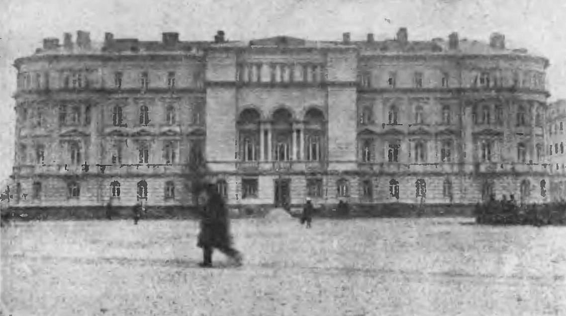 Gmach sądów wojskowych w II Rzeczypospolitej, mieszczący Najwyższy Sąd Wojskowy, Prokuraturę przy NSW, Wojskowy Sąd Okręgowy Nr I i Prokuraturę przy WSO I.